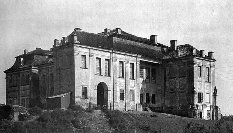 Równe, zamek-pałac Lubomirskich - widok boczny.